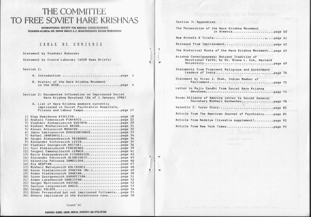 Free Soviet Hare Krishnas